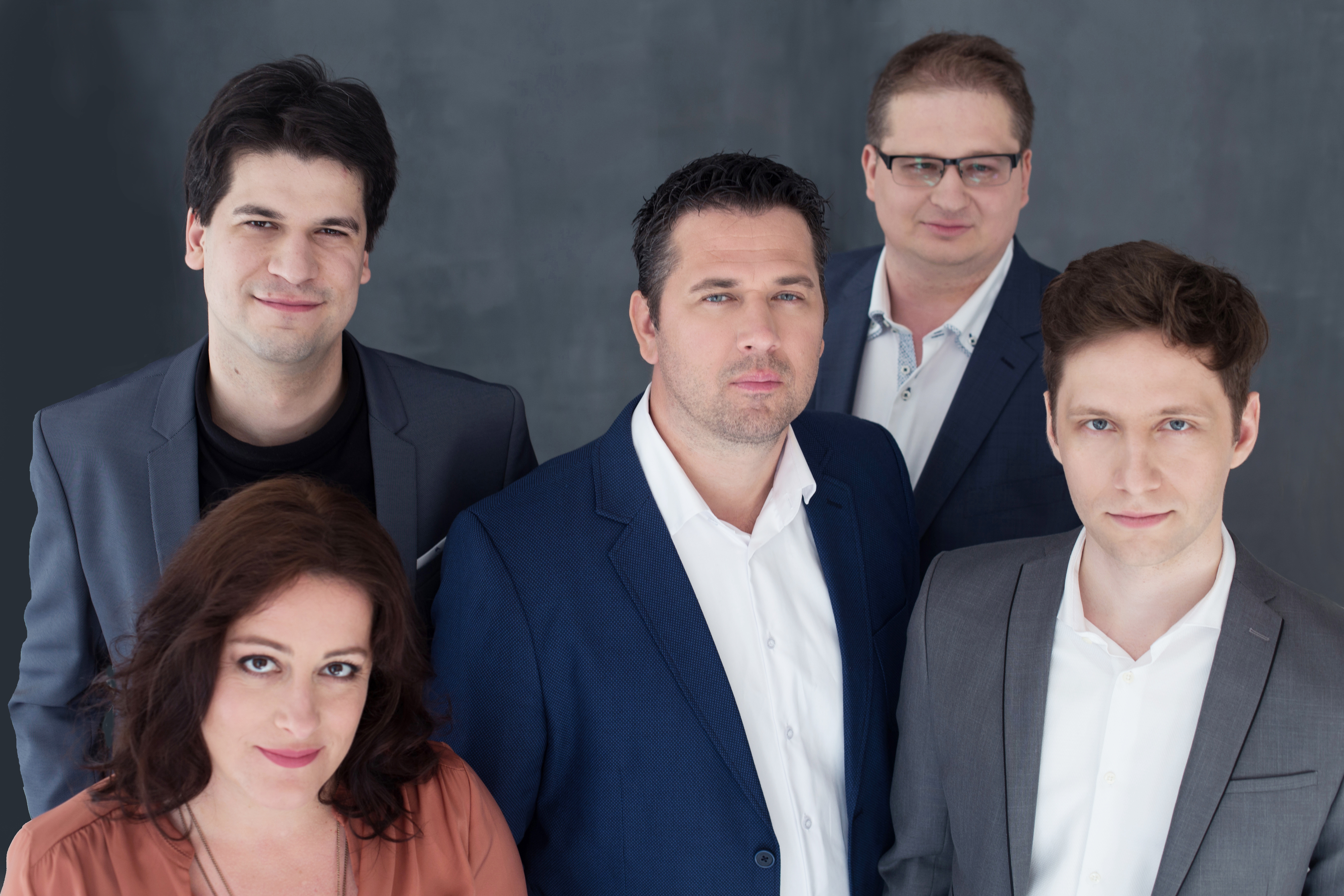 Virágh András Gábor, Solti Árpád (hátul) Varga Judit, Kutrik Bence, Bella Máté